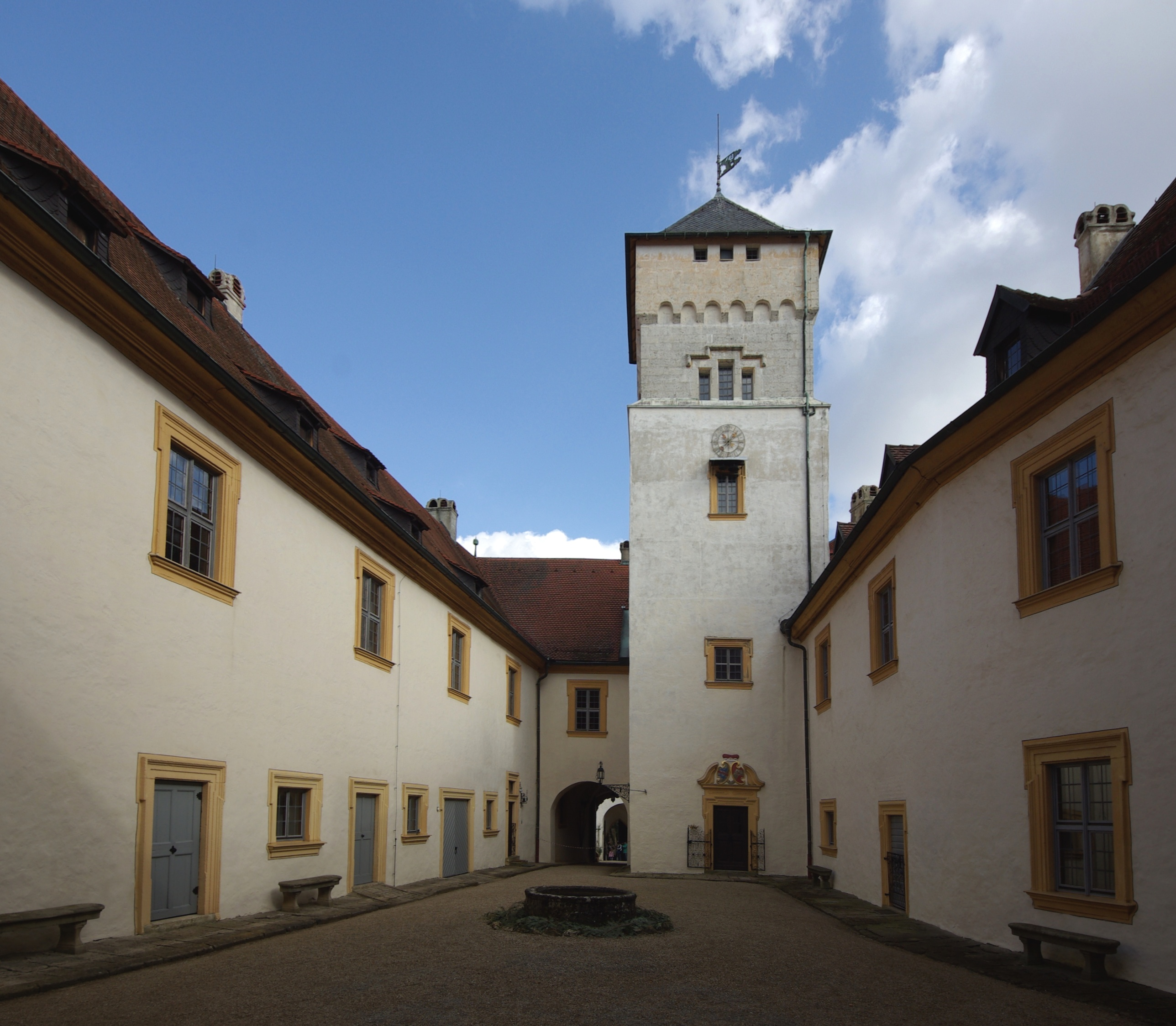 Schloss Greifenstein in der Fränkischen Schweiz